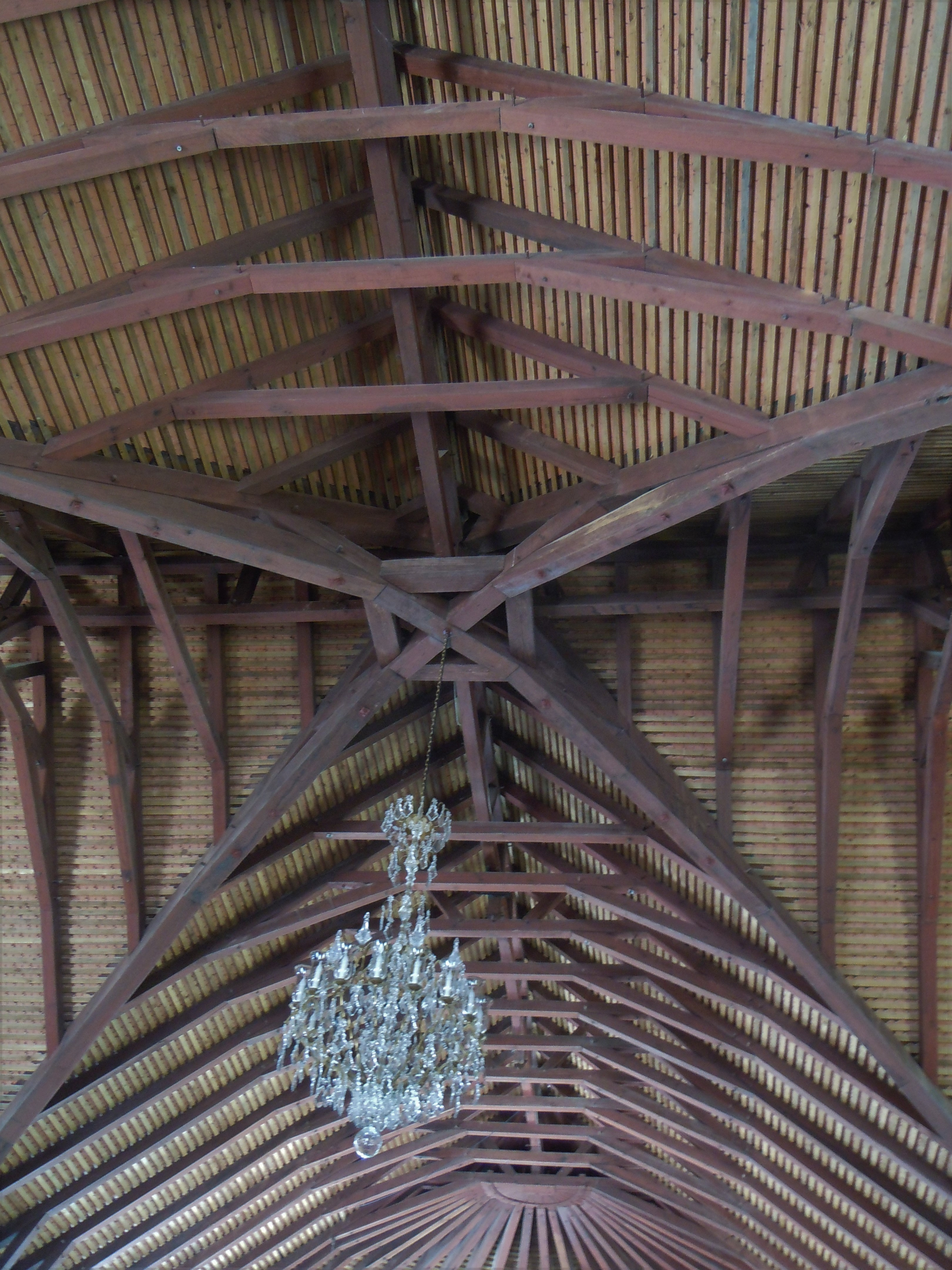 Plafond de l'Église Saint-Étienne du Marin, Martinique.